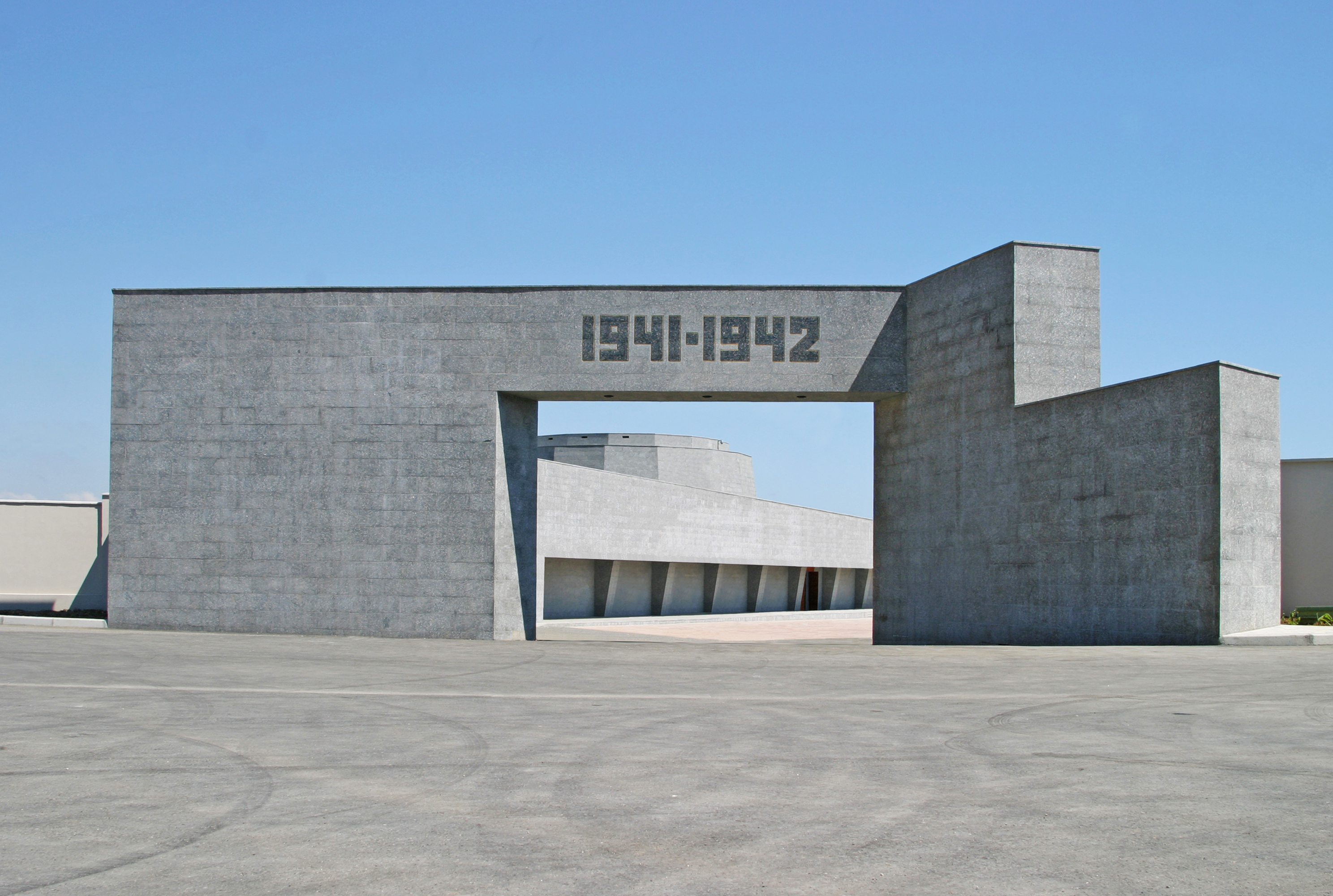 Мемориальная арка на 35-й бб